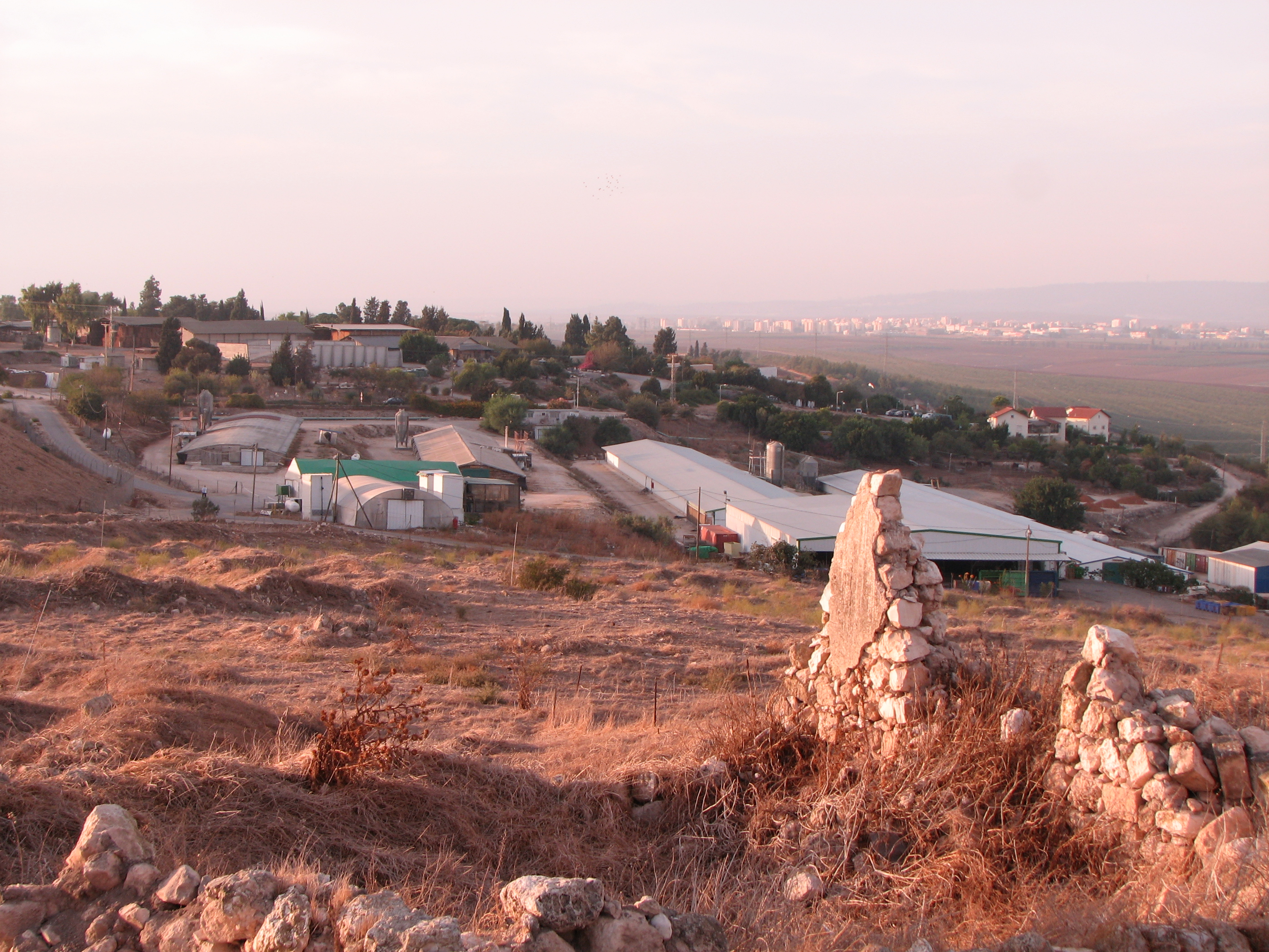 קיבוץ יזרעאל מצולם מתל יזרעאל